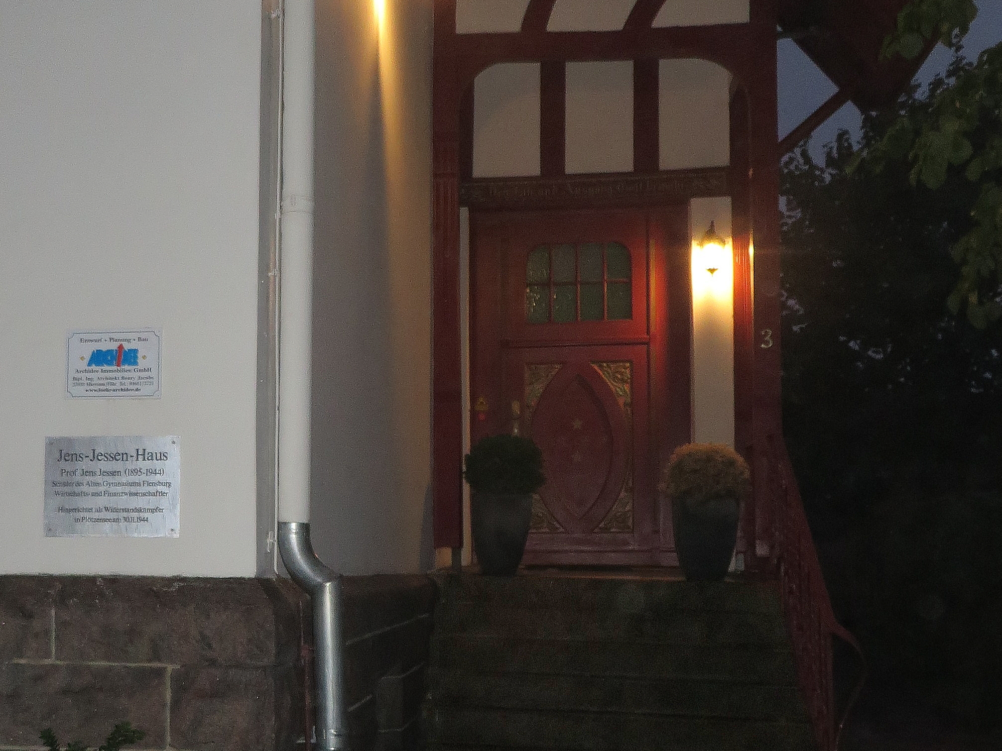 Eingang vom Jens-Jessen-Haus mit Gedenktafel links an der Mauer zur Nacht (Flensburg 2014-09-30), Bild 02